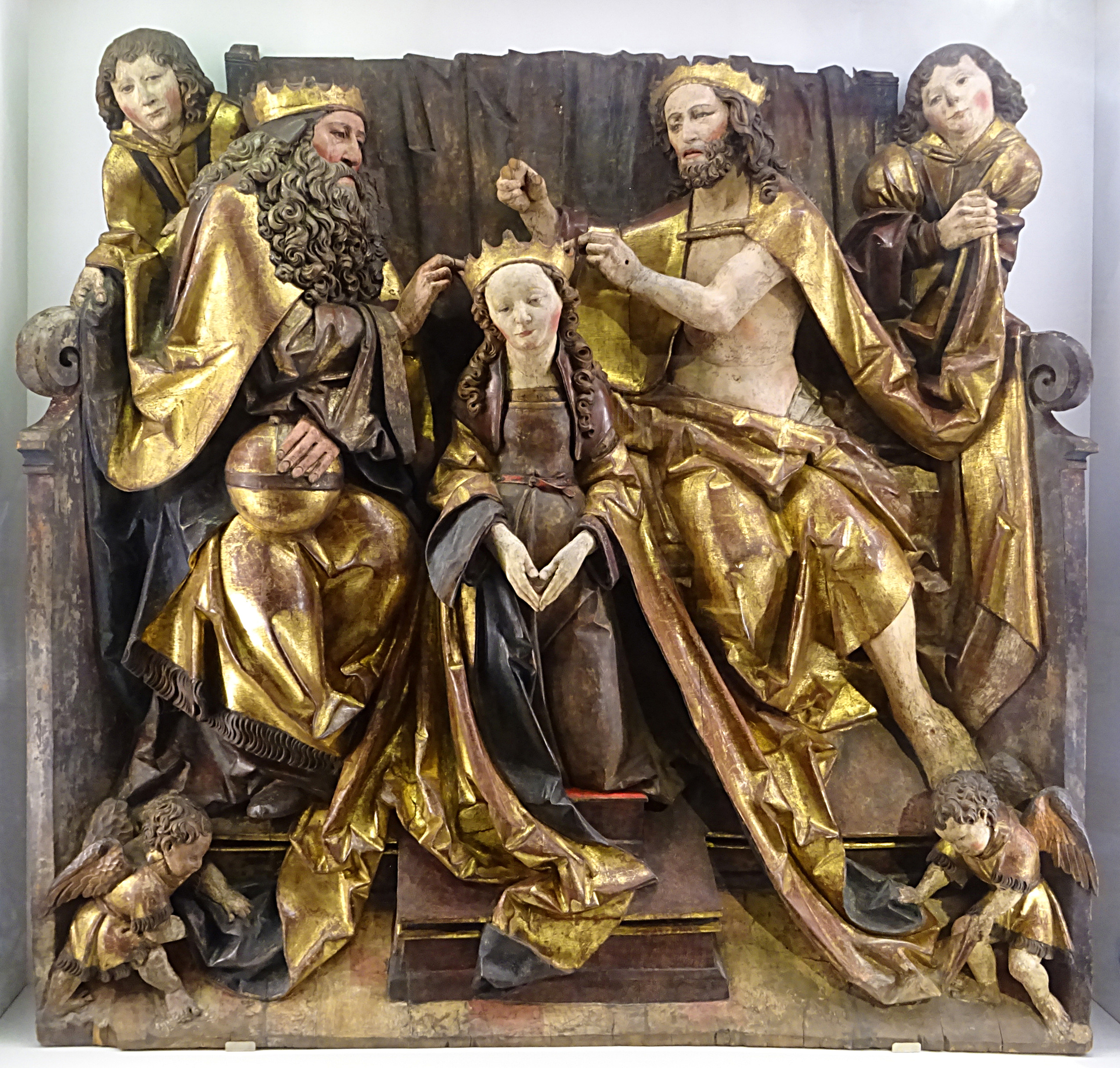 Die Marienkrönung von 1520 des Meisters der Thammenhainer Madonna stellt die Krönung Marias im Himmel durch die Dreifaltigkeit von Vater, Sohn und heiligem Geist dar. Sie stammt mit großer Wahrscheinlichkeit aus der Jenaer Stadtkirche St. Michael. Das Original befindet sich im Jenaer Stadtmuseum.